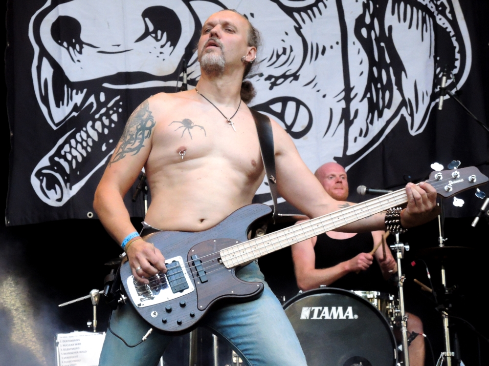 The Idiots auf dem Turock Open Air in Essen am 21.08.2015.